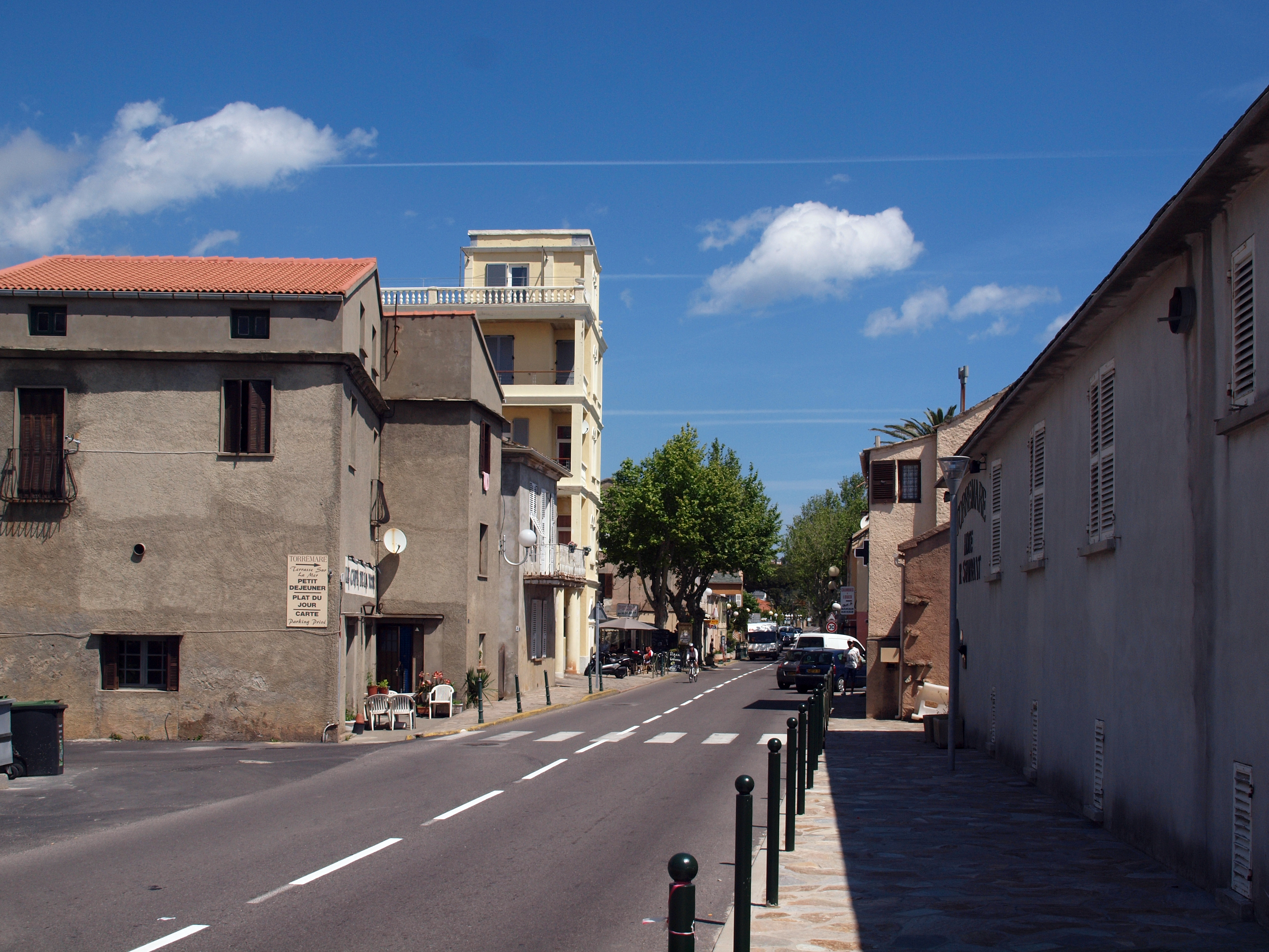 Santa-Maria-di-Lota, Cap Corse (Corse) - La route du bord de mer (D80) traversant l'agglomération de Miomo